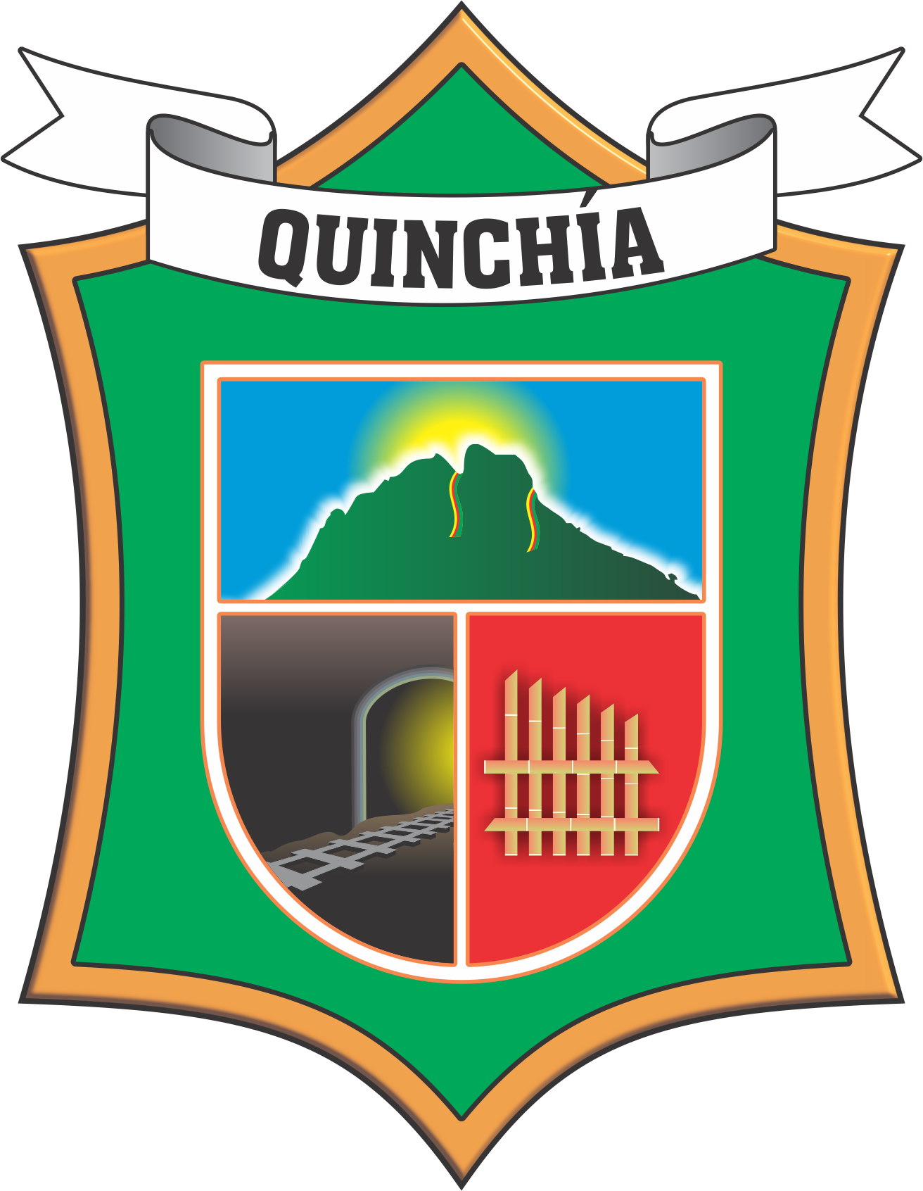 Está compuesto por tres blasones que contienen en si la historia de nuestro municipio, el primero y que ocupa la mitad del escudo sobre cielo azul celeste el CERRO BATERO abrazado por la bandera, símbolo natural de Quinchía y sol brillante que bordea su cima en forma de corona, abajo ocupando la tercera parte del escudo un SOCABON símbolo de la riqueza minera de la región y en el otro tercio el QUINCHO O CERCO palabra indígena que genera el nombre de Quinchía y sobre campo verde y dorado en forma irregular la palabra QUINCHÍA en cinta blanca como corona o remate del escudo.​ Diseño: Orlando Puerta